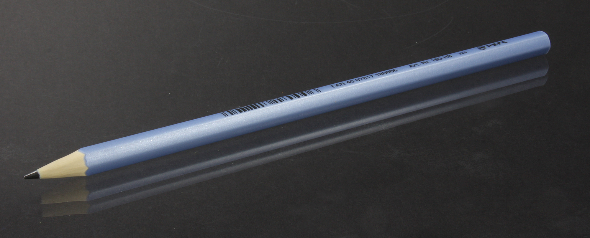 WPC-Bleistift